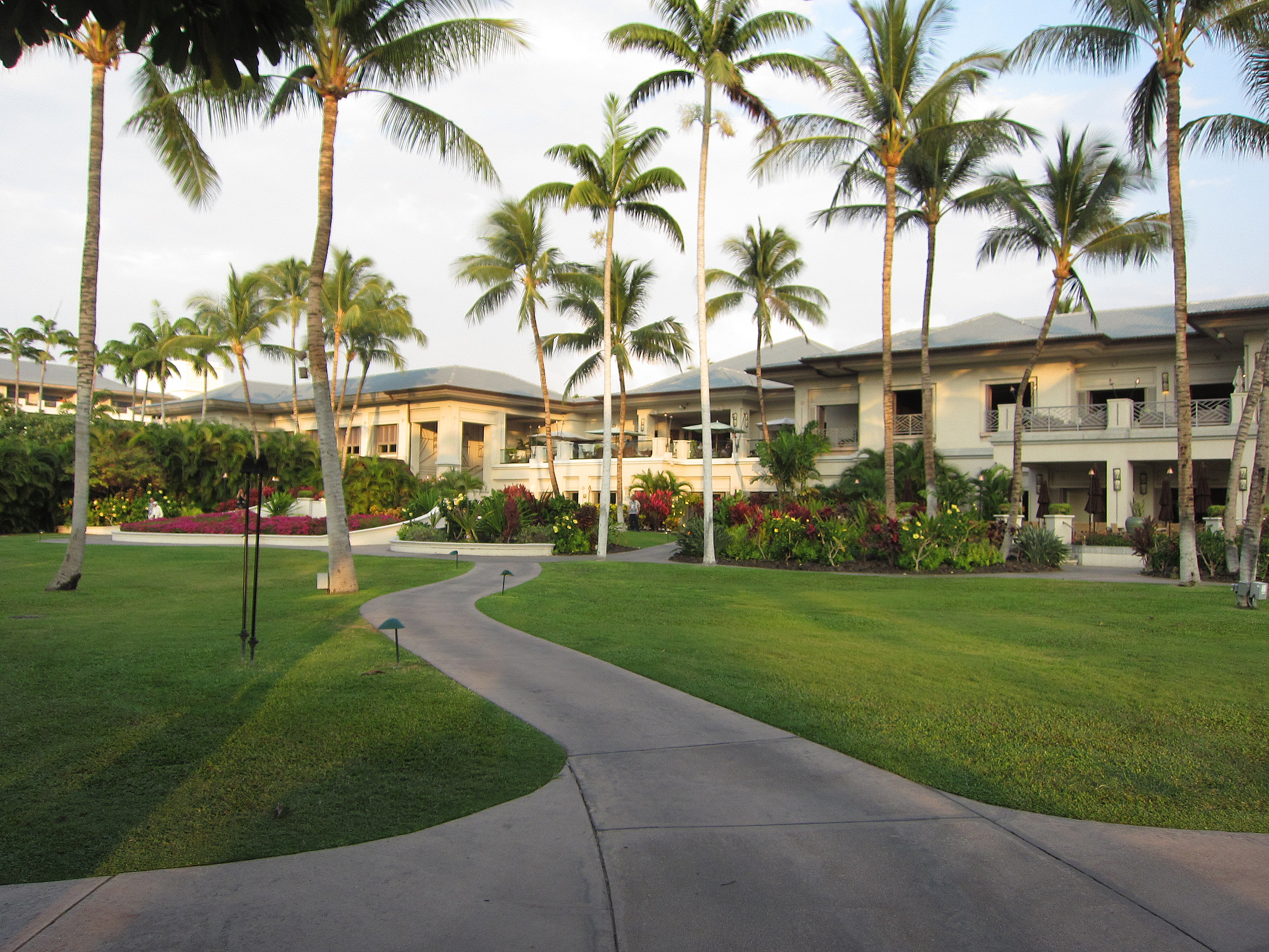 January, 2014 - Big Island